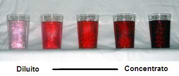 Diluizione-Concentrazione